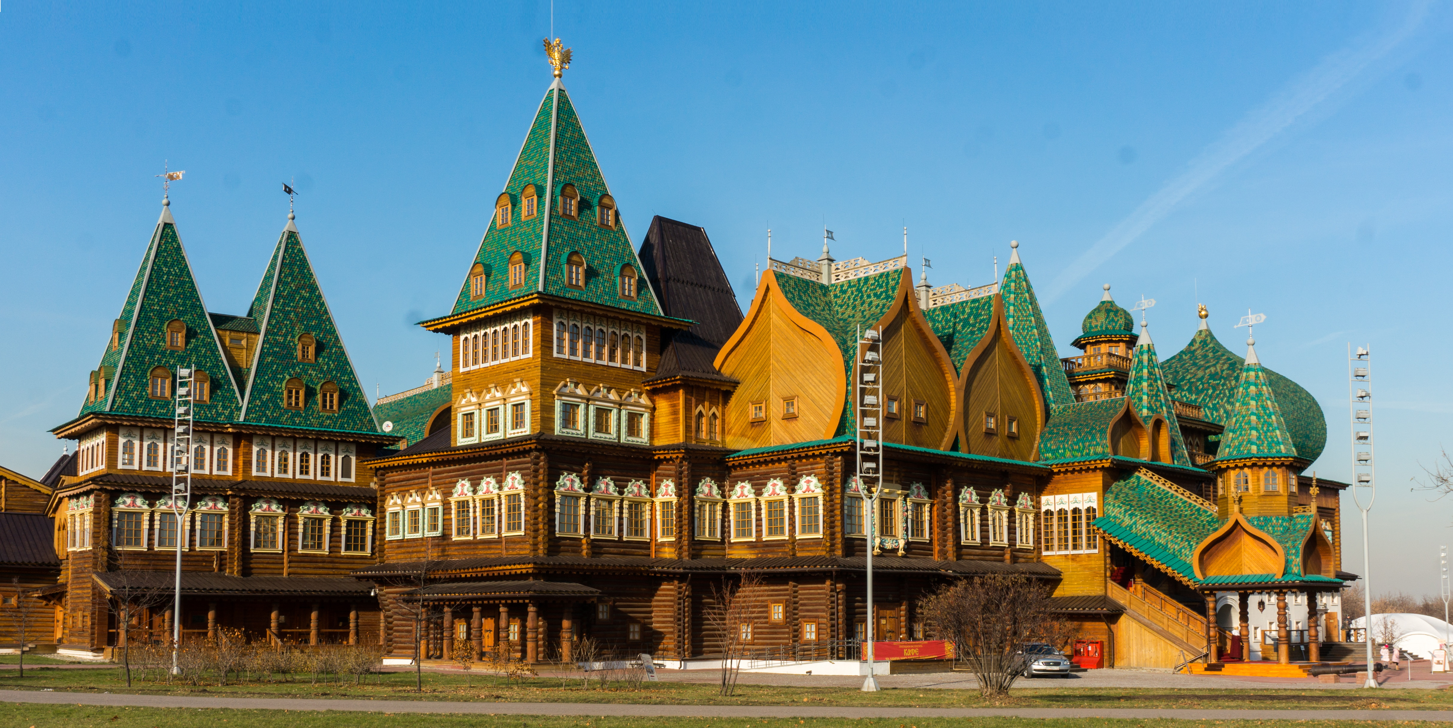 Дворец Алексея Михайловича